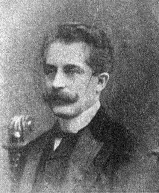 Österreichischer Politiker, Reichsratswahl 1907, Name siehe Dateiname